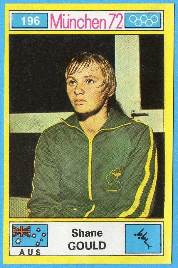 MUNCHEN/MONACO '72-PANINI-Figurina n.196- GOULD - AUSTRALIA -NUOTO